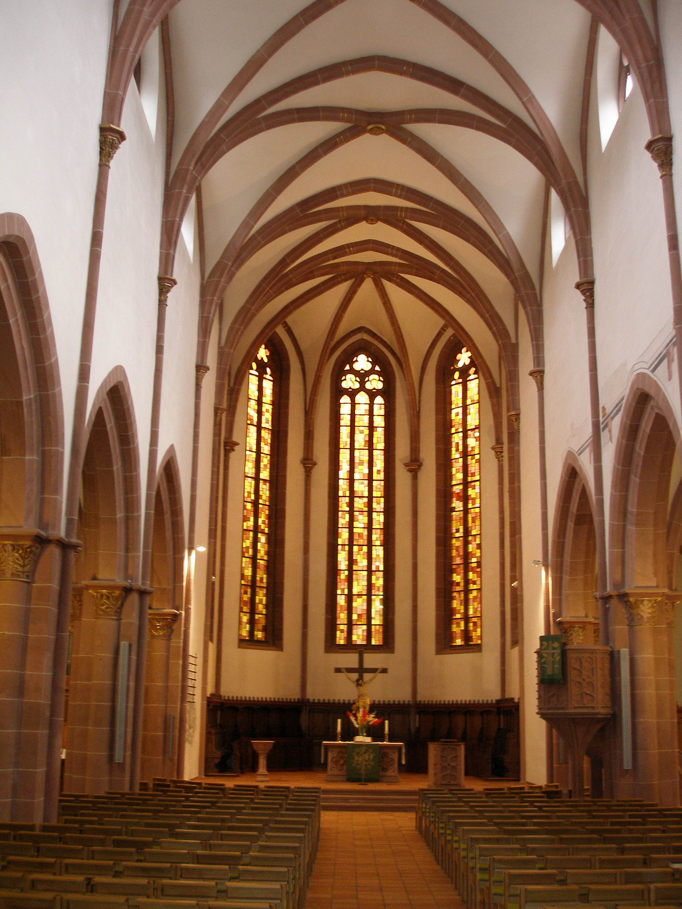 Lahr/Schwarzwald Stiftskirche innen